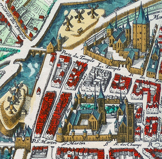 Extrait du Plan de Mérian.